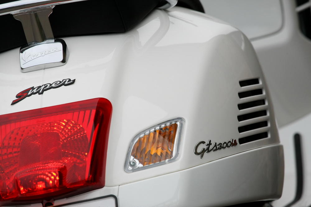 Vespa GTS 300 Super in weiß